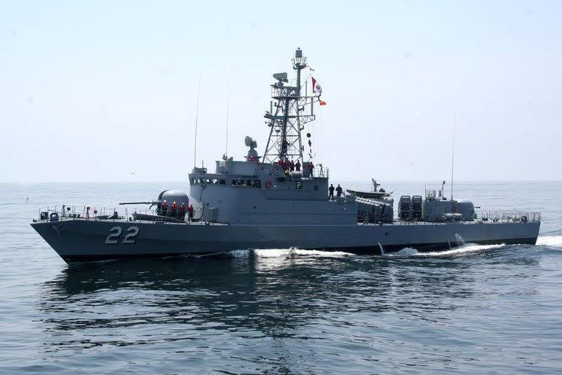 La corbeta peruana BAP Santillana (CM-22)